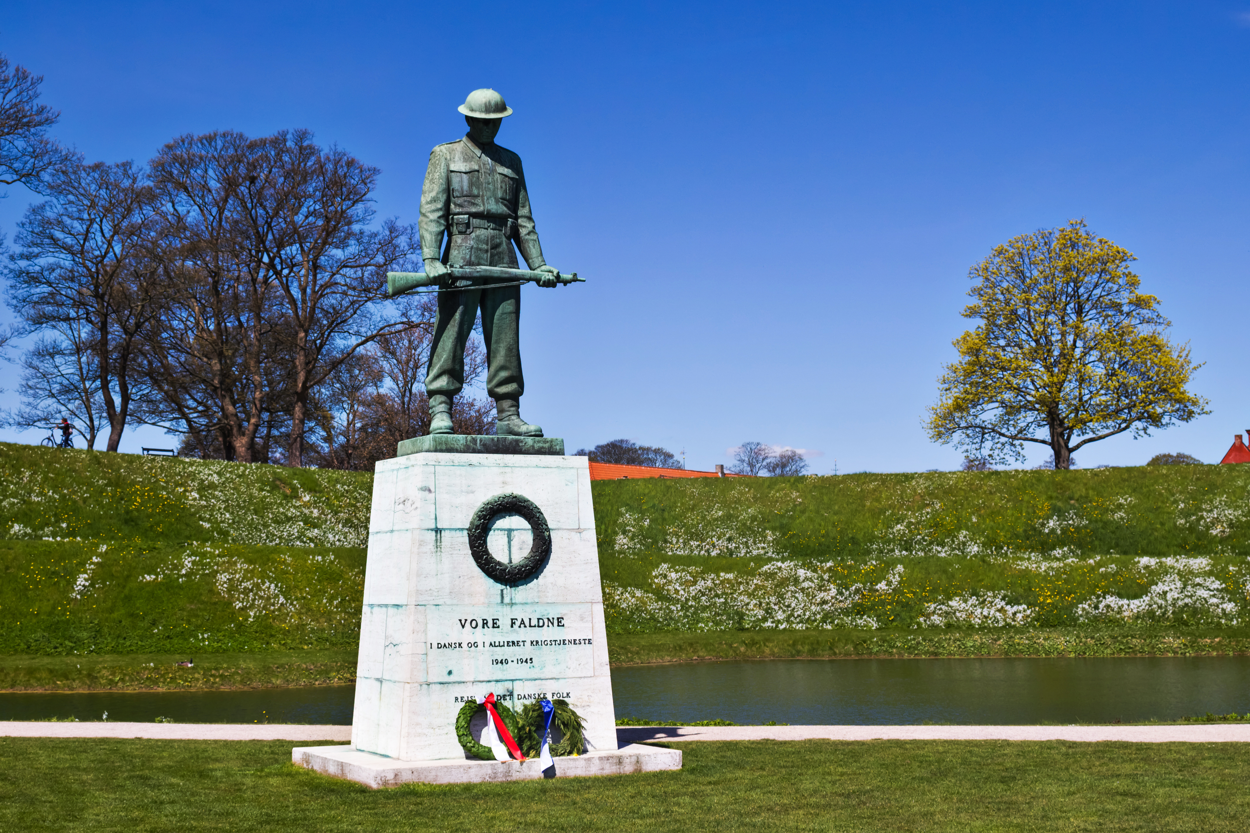 Estatua adicada aos soldados daneses caídos durante a Segunda Guerra Mundial.